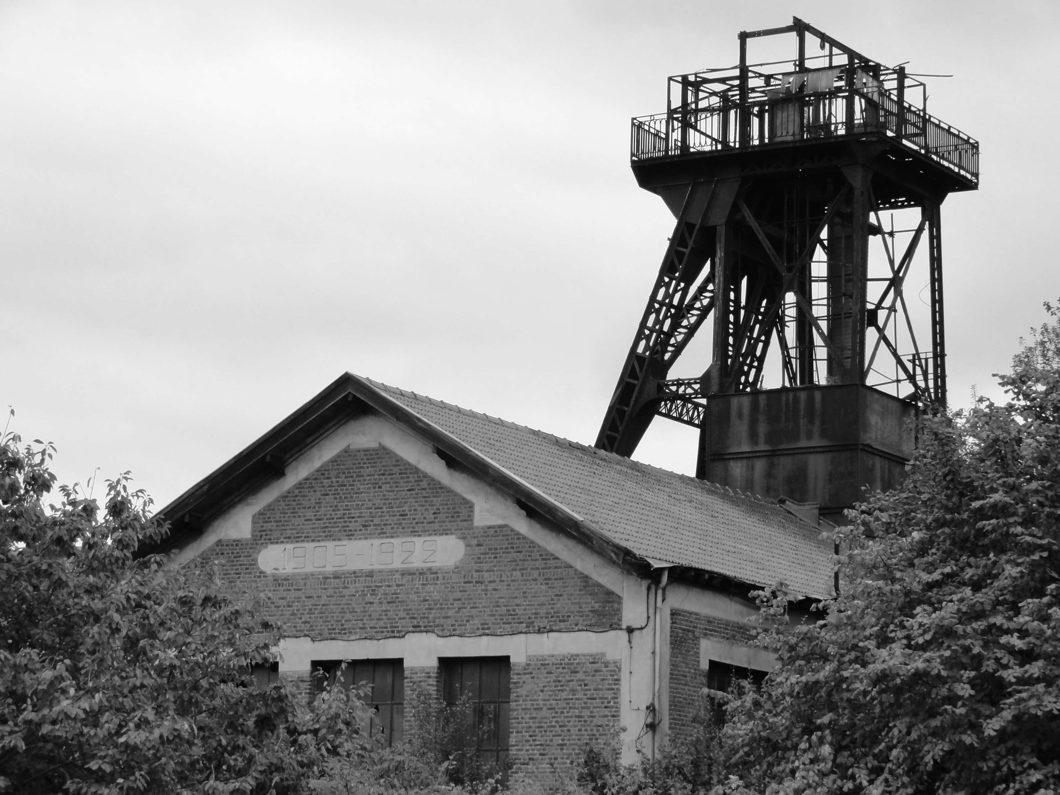 La fosse n° 5 de la Compagnie des mines de Meurchin était un charbonnage du bassin minier du Nord-Pas-de-Calais constitué d'un seul puits situé à Billy-Berclau, Pas-de-Calais, Nord-Pas-de-Calais, France.